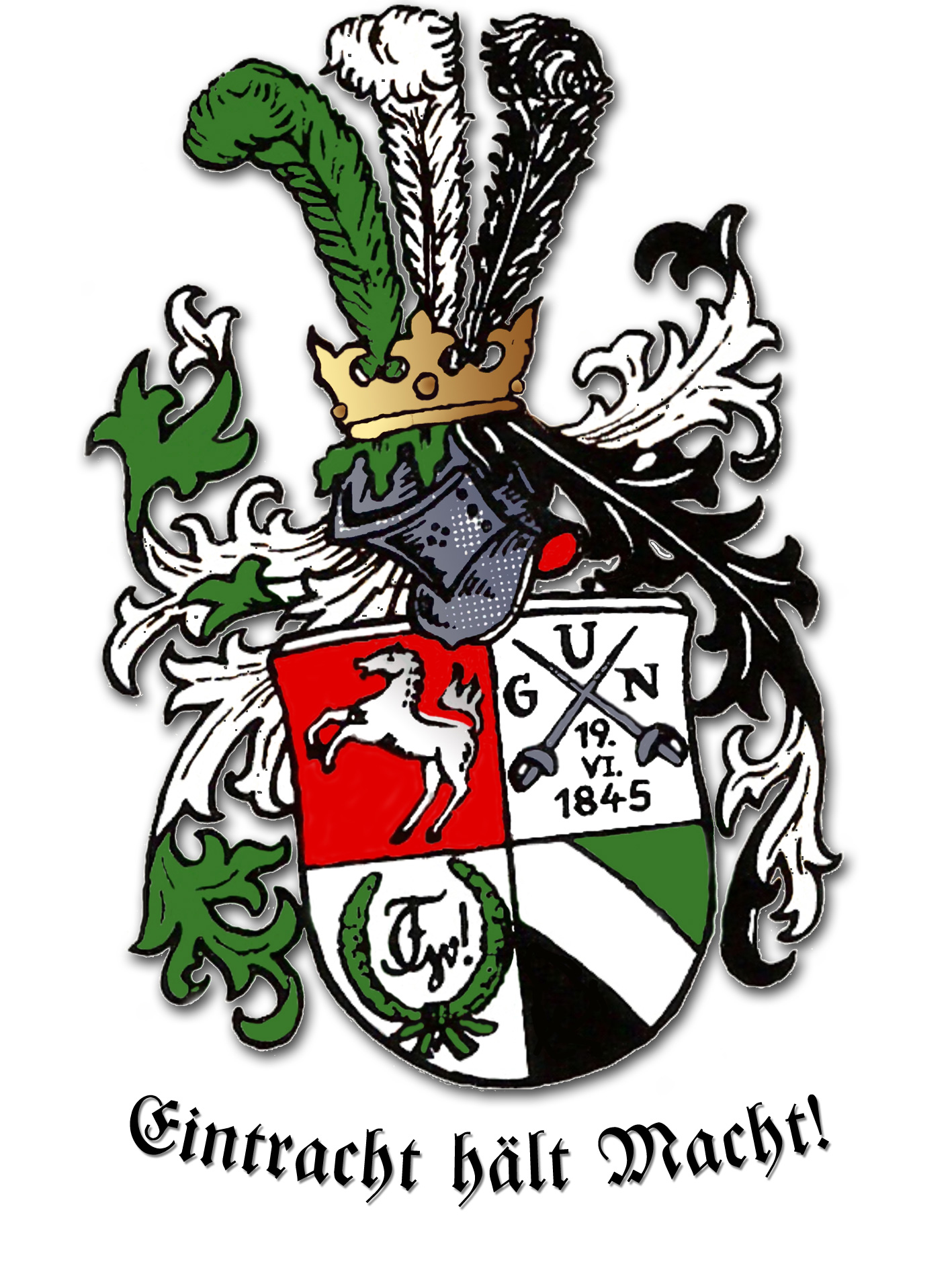 Studentenwappen des Corps Guestphalia Berlin